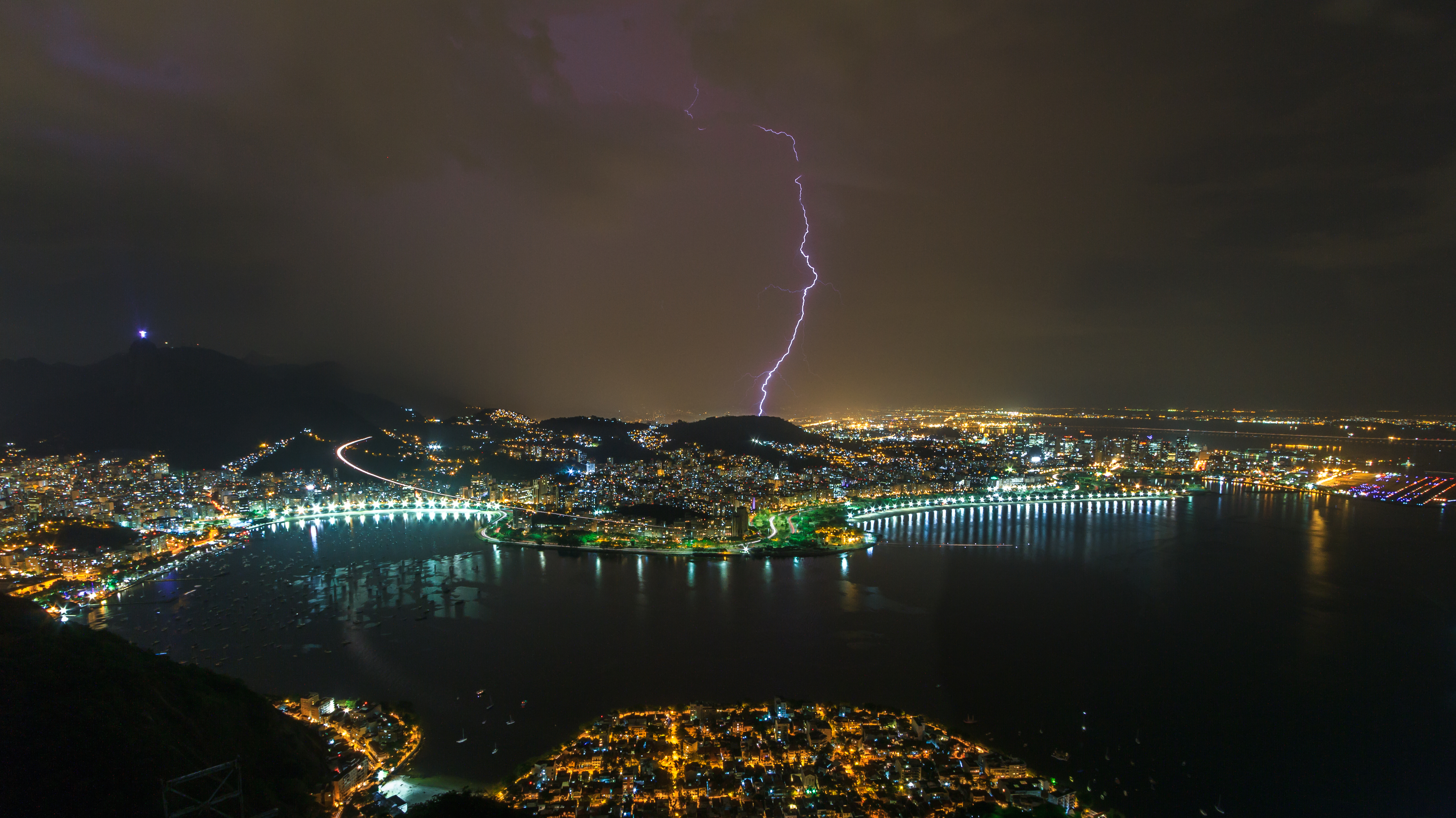 Tempestade no Rio de Janeiro visto do Pão de Açúcar